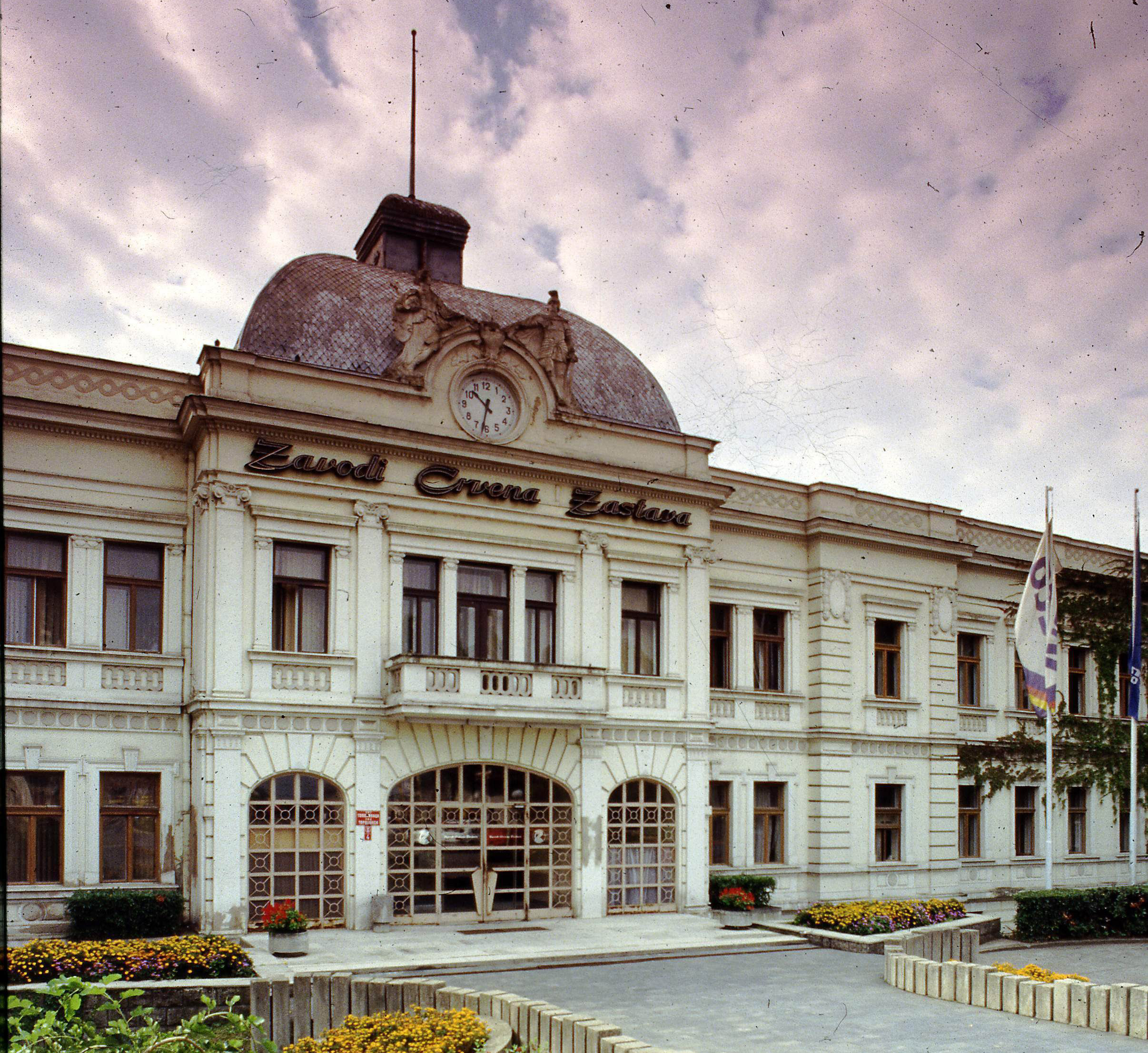 "Zastava" main gate in Kragujevac, Serbia/L'entrée principale du complexe industriel "Zastava" à Kragujevac, Serbie